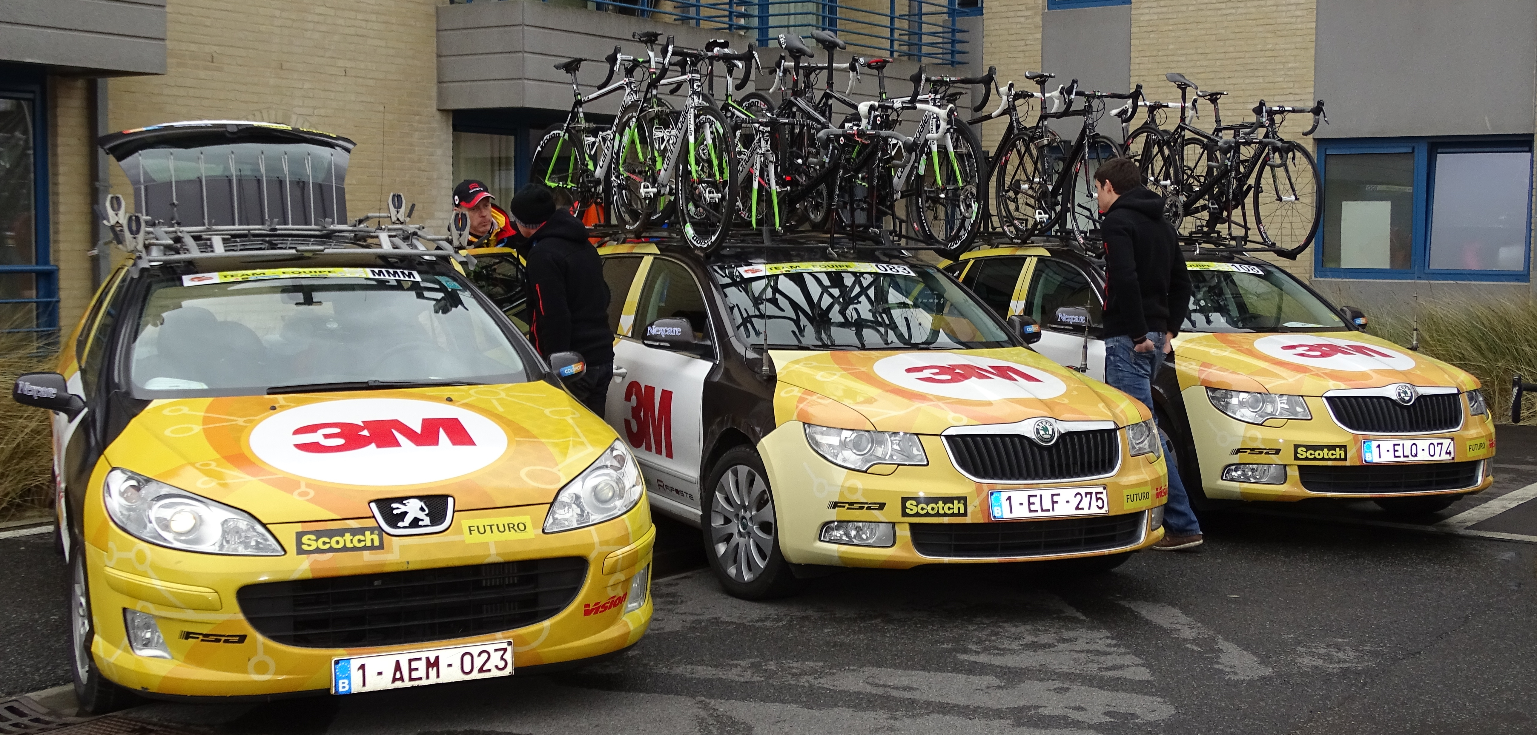 Reportage réalisé le mardi 31 mars à l'occasion de du départ de la première étape des Trois jours de La Panne 2015 à La Panne, Belgique.